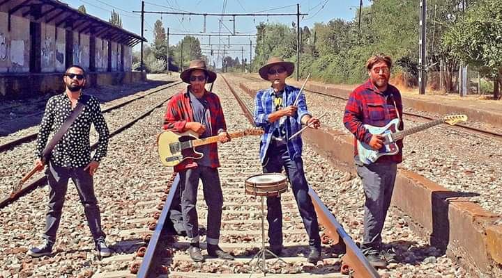 Promocional 2019